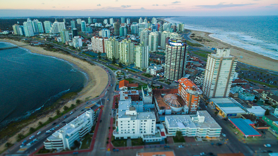 Пунта-дель-Эсте